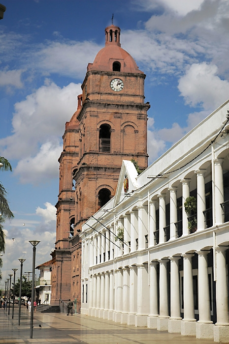 Vista de las torres de la Catedral Metropolitana de la ciudad de Santa Cruz de la Sierra, Bolivia.